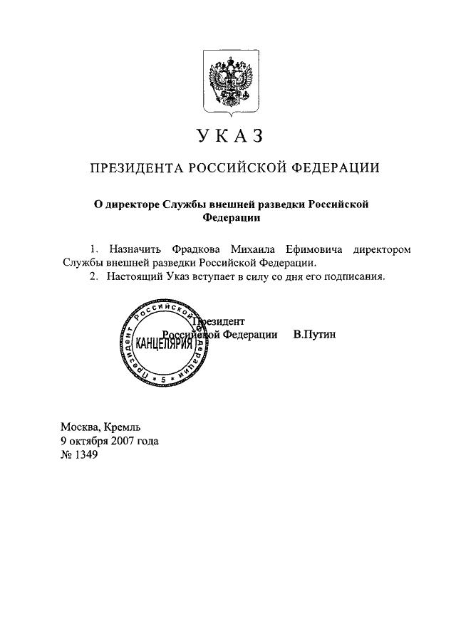 La copie scanée de l'Oukase de nomination de M. Fradkov comme Directeur du SVR